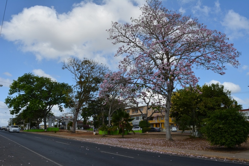 ROBLES FLORECIDOS PARQUE LIBERTADOR LA CHORRERA PANAMA